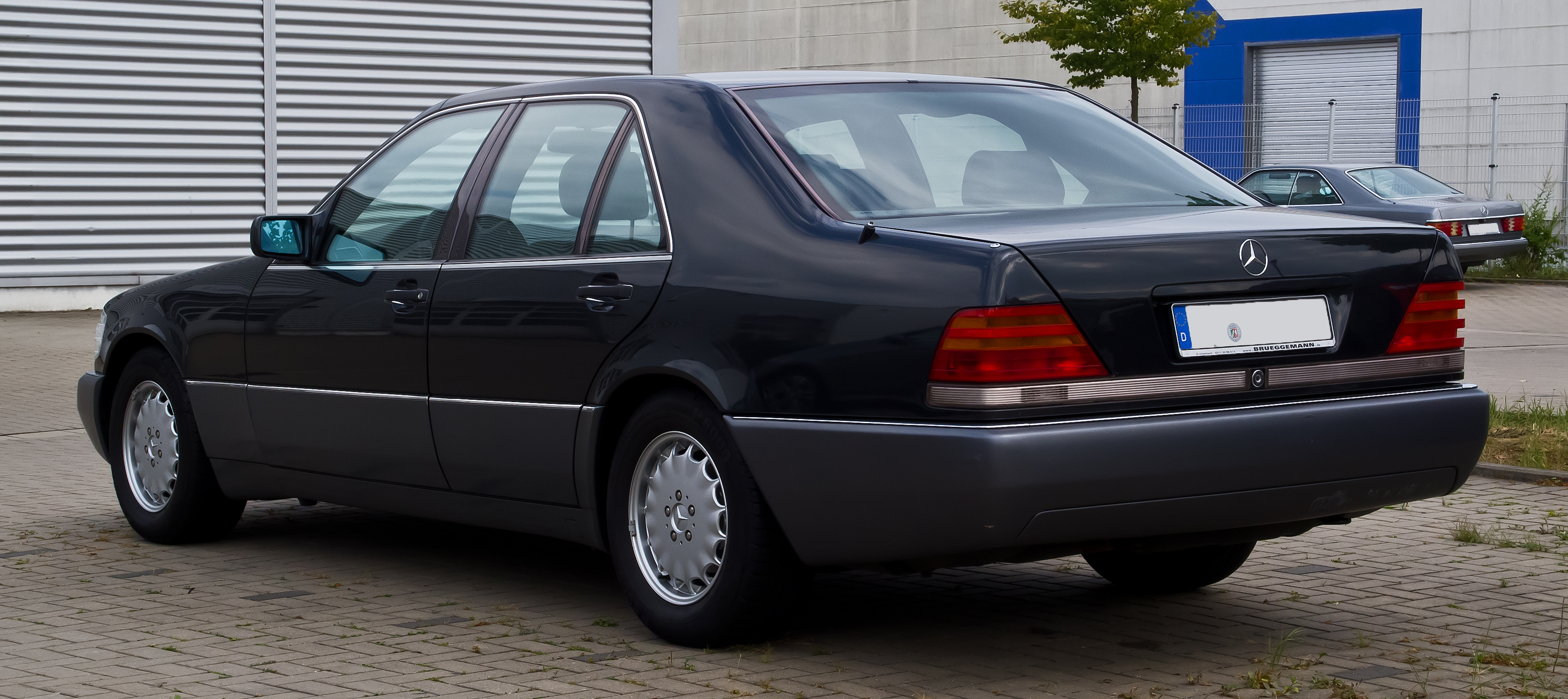 Mercedes-Benz S-Klasse (W 140, Facelift)